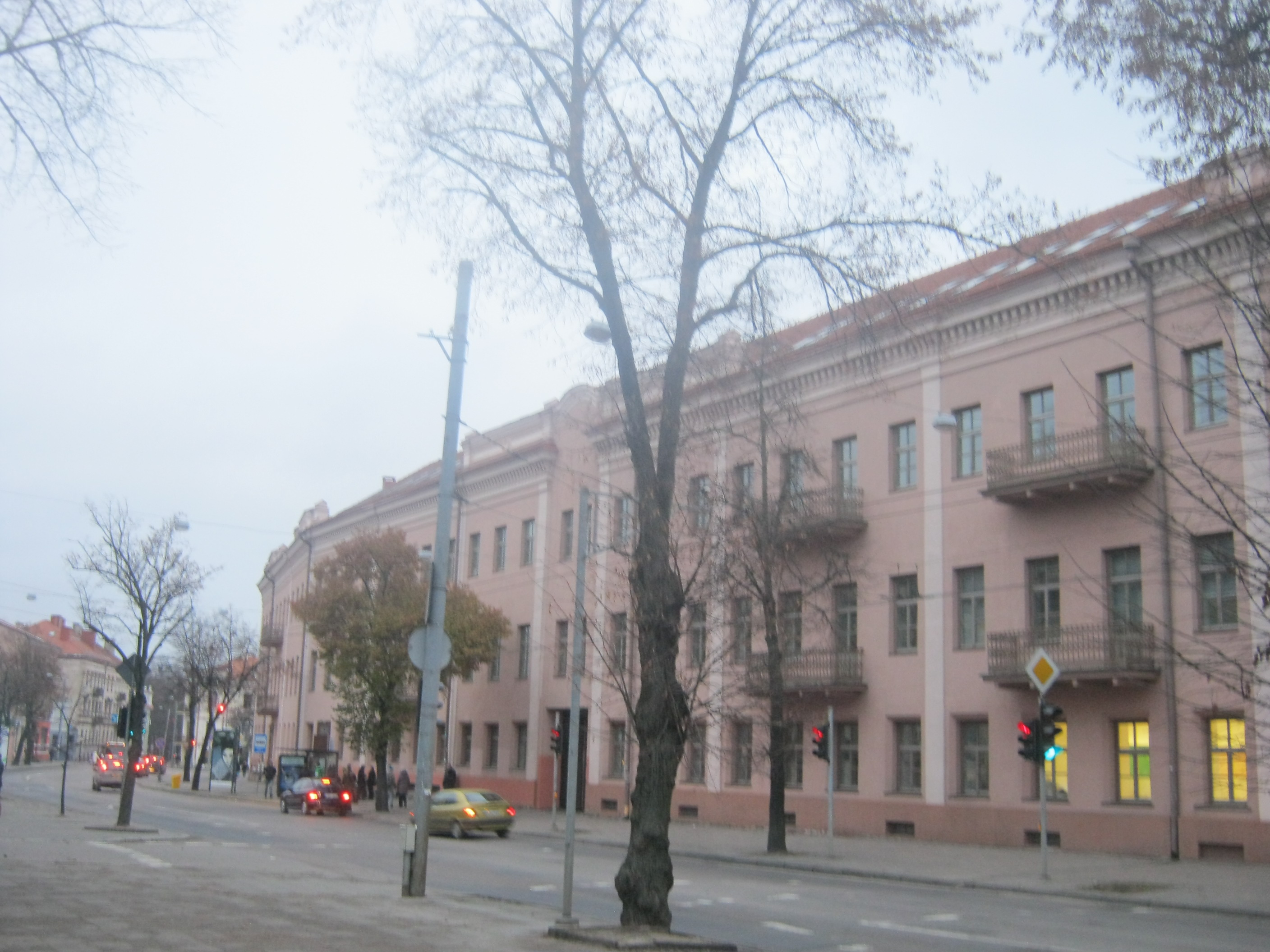 Vilniaus Gedimino Technikos Universitetas